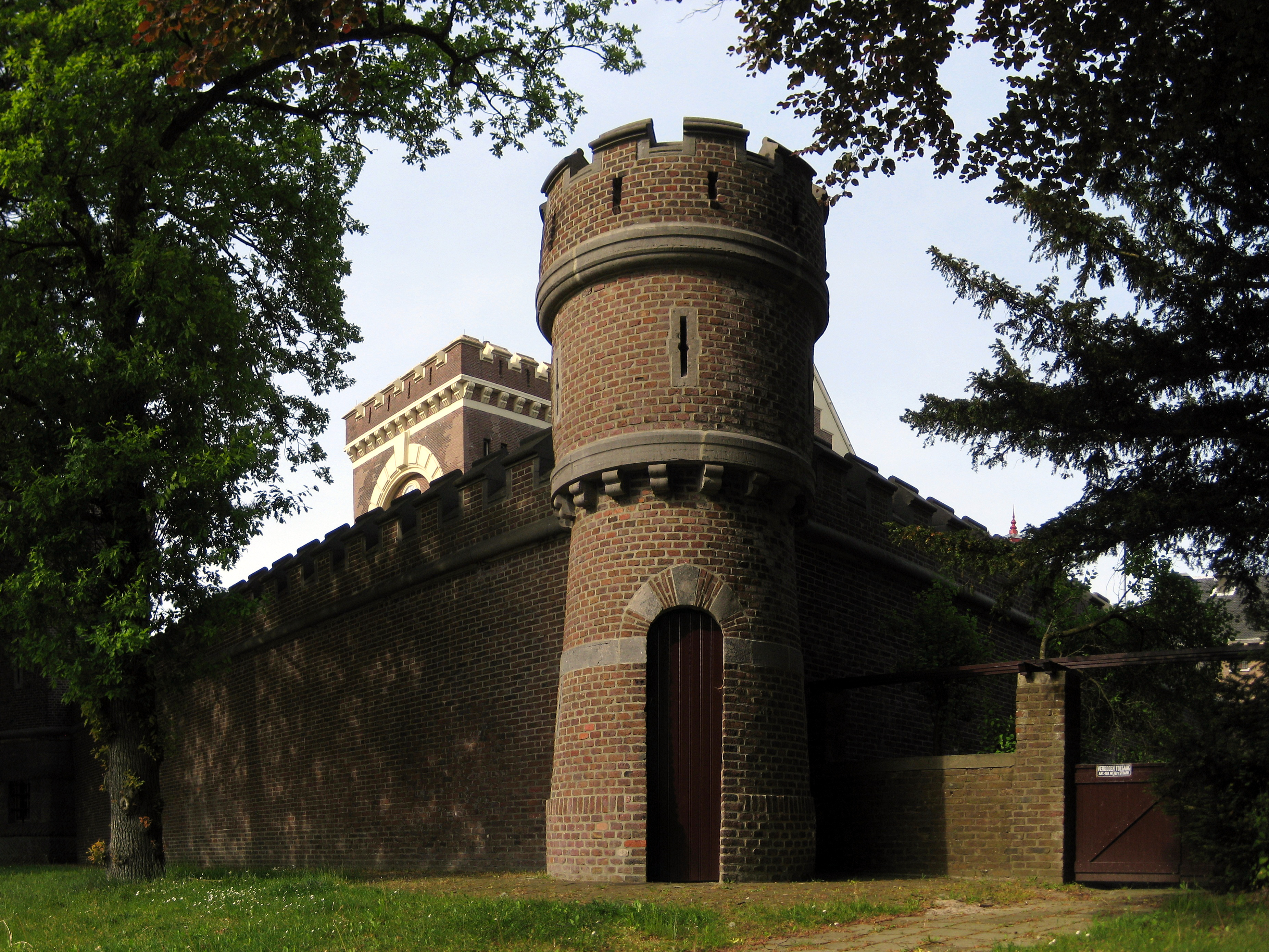 Hoektuorke yn de muorre om de eardere Cellulaire Strafgevangenis (sûnt 1951: Van Mesdagkliniek) oan de Herewei yn Grins. It kompleks, dat setten is yn 1882-'83, waard ûntwurpen troch J.F. Metzelaar (1818-1897) en is in ryksmonumint (rm 483406).